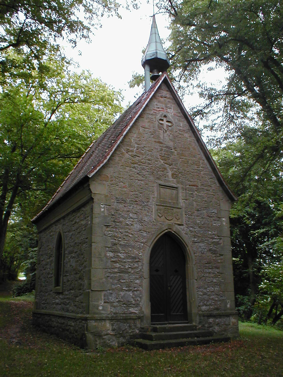 Kapelle auf dem Calvarienberg in Gundelsheim. Erbaut 1627 an der Straße von Gundelsheim nach Mosbach, an ihren heutigen Standort versetzt in der Mitte des 19. Jhd.